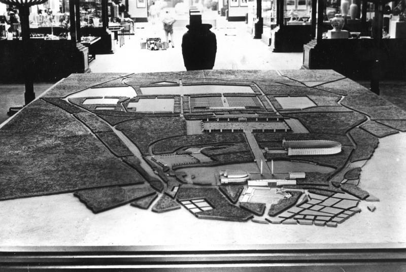 Modell des Reichsparteitagsgeländes Scherl Ein Modell des Reichsparteitaggeländes, das in Nürnberg, der Stadt der Reichsparteitage, entsteht, bildet einen der Glanzpunkte der Ausstellung im Deutschen Haus der Pariser Weltausstellung. 29.5.1937 [Herausgabedatum] [Paris.- Weltausstellung, Modell des Reichsparteitagsgeländes im Deutschen Haus.]